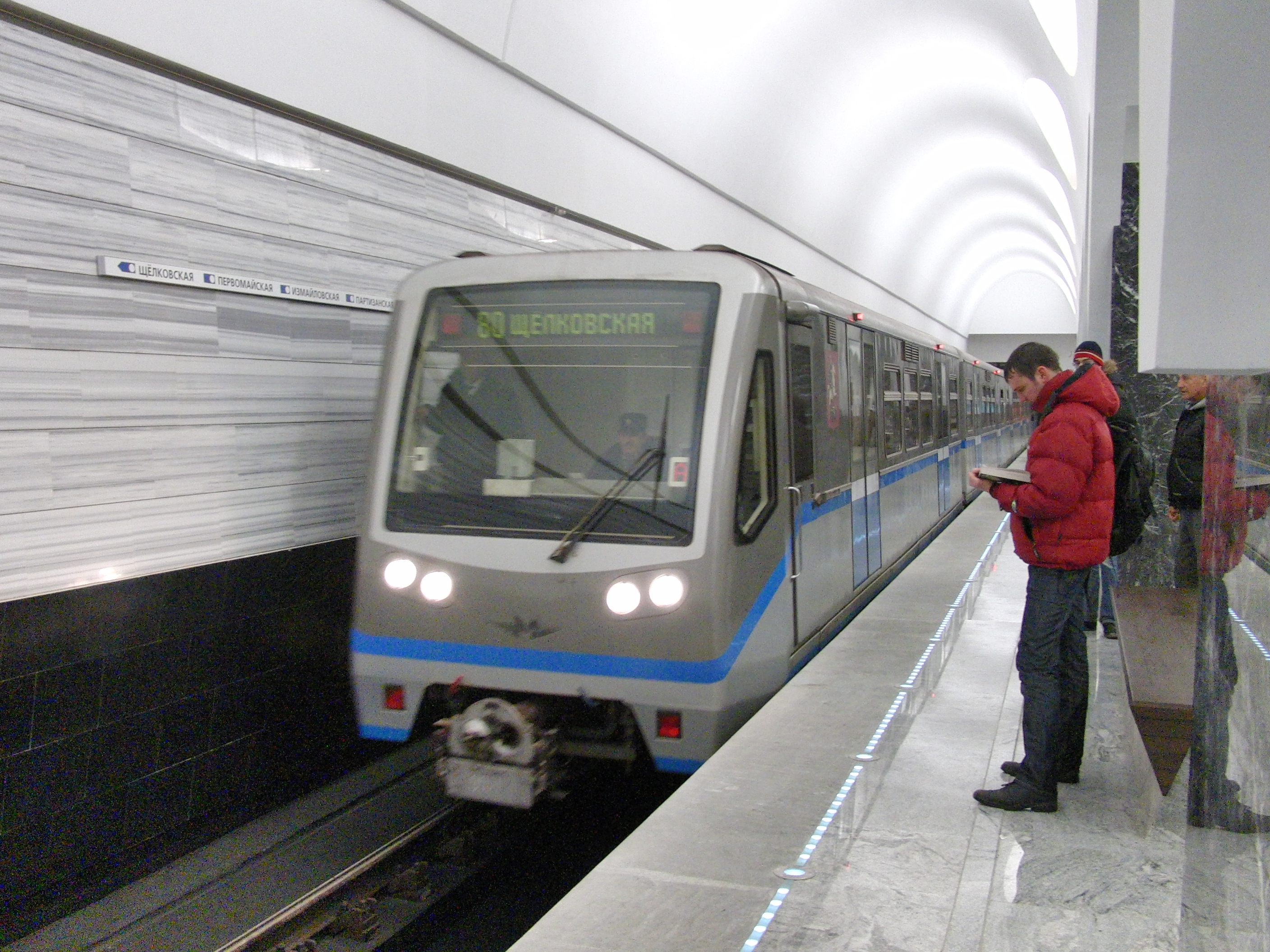 Volokolamskaya (Волоколамская)